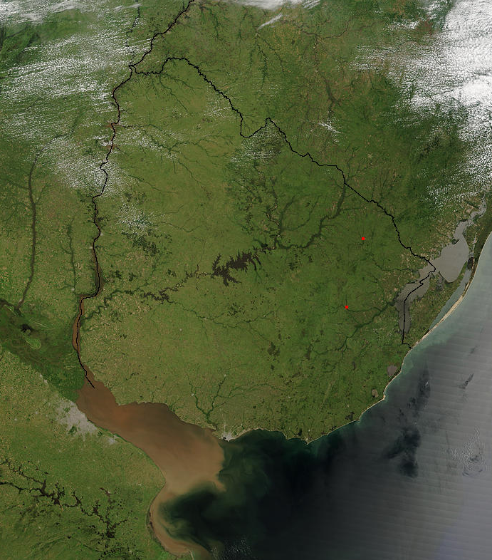 Foto de Uruguay tomada desde satélite. Se aprecian claramente los límites con Brasil y Argentina, y el Río de la Plata al sur.